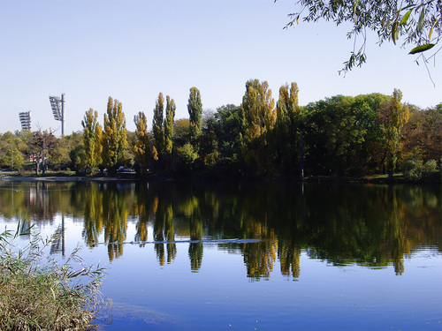 Нижний пруд на р. Славянка